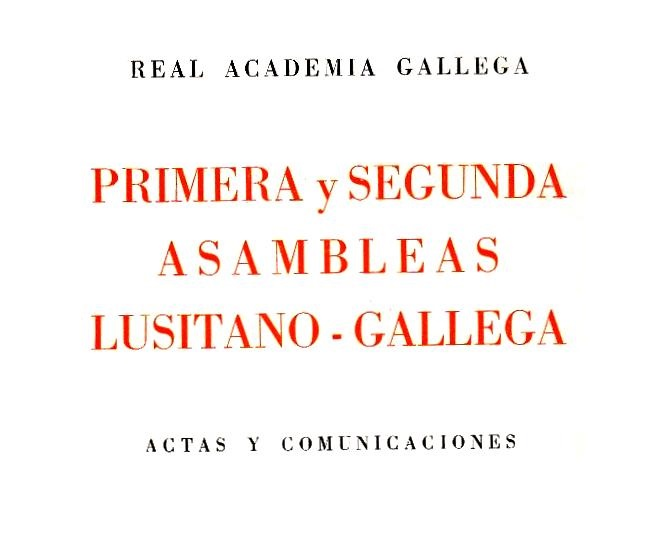 Primera y segunda asambleas lusitano-gallega